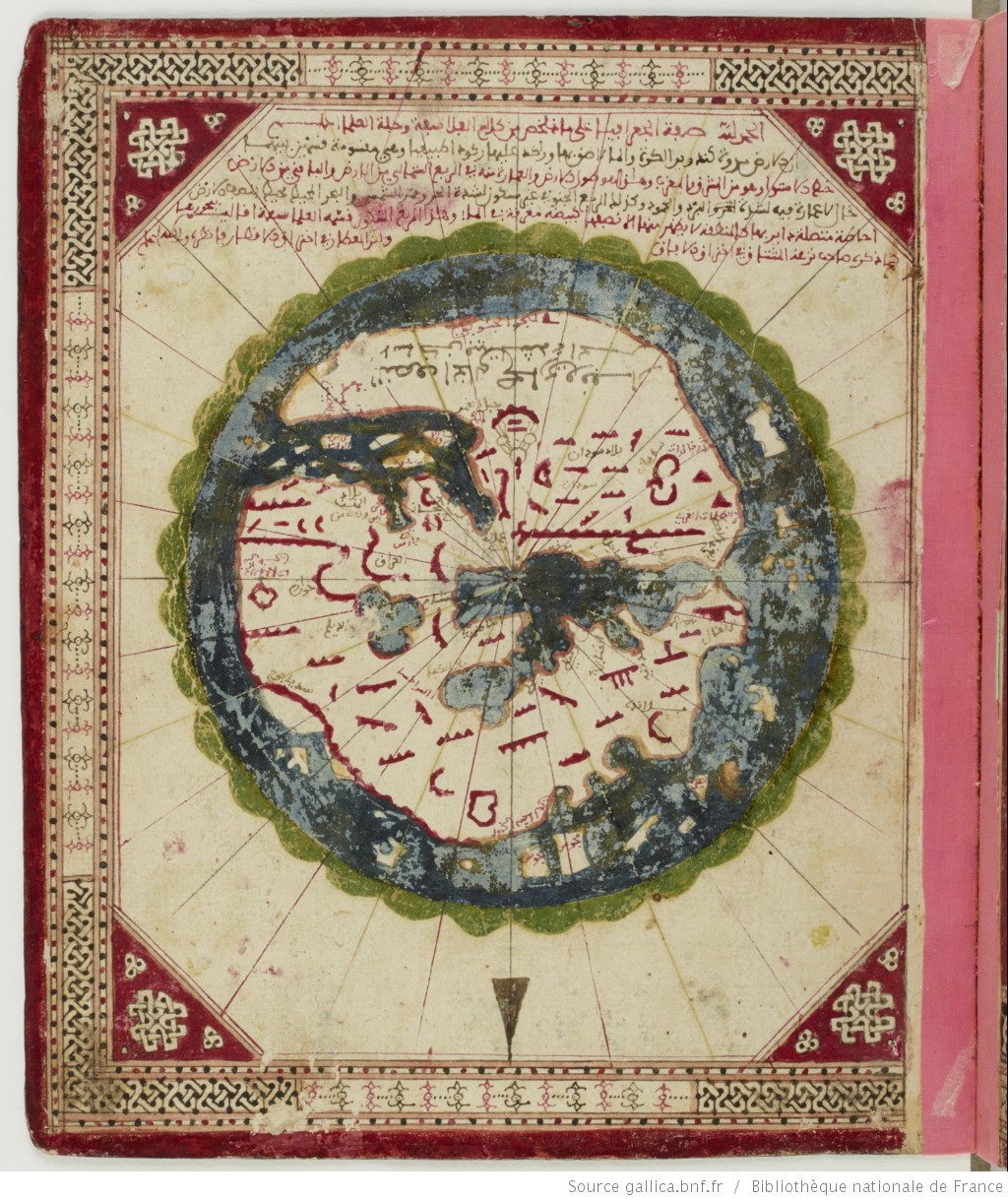 كتاب الطبلة